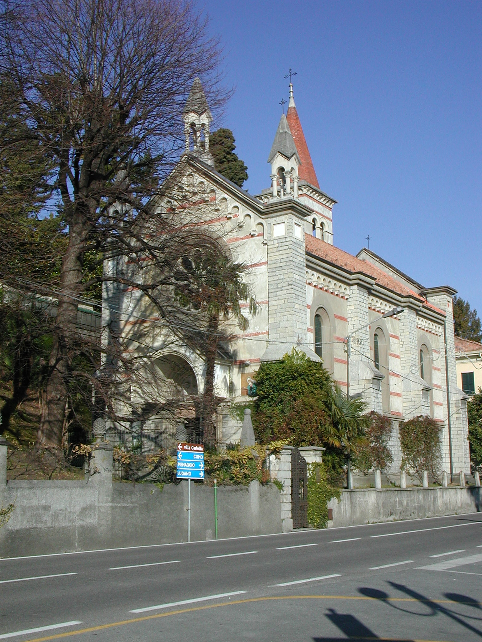 Die Anglikanische Kirche von Cadenabbia-Griante